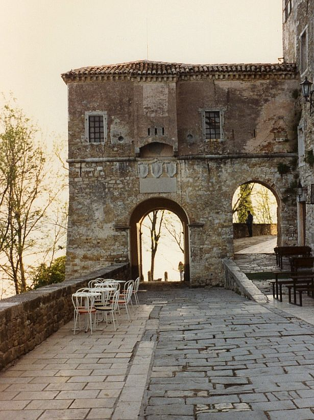 Stadttor in Motovun